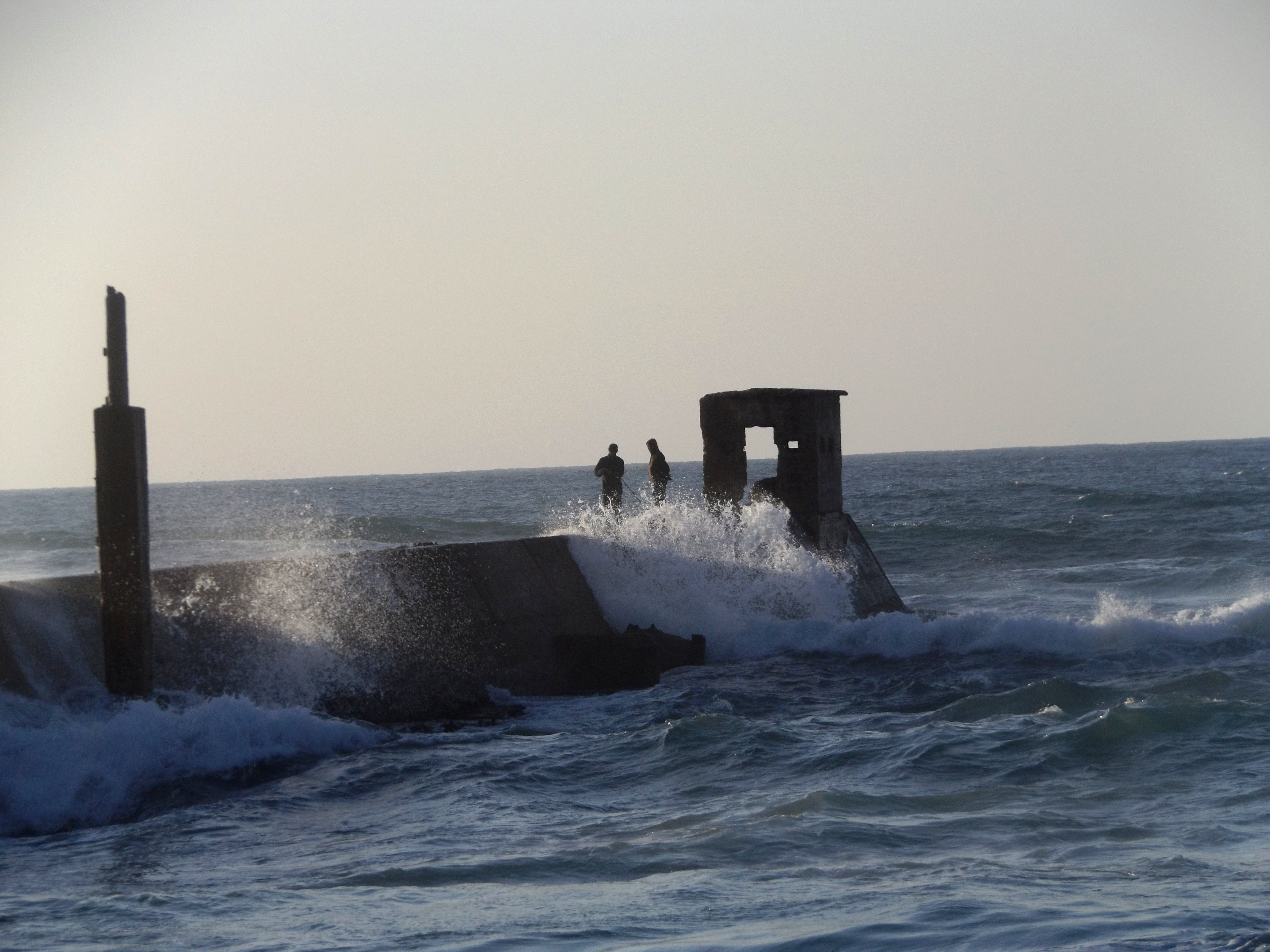 שובר גלים